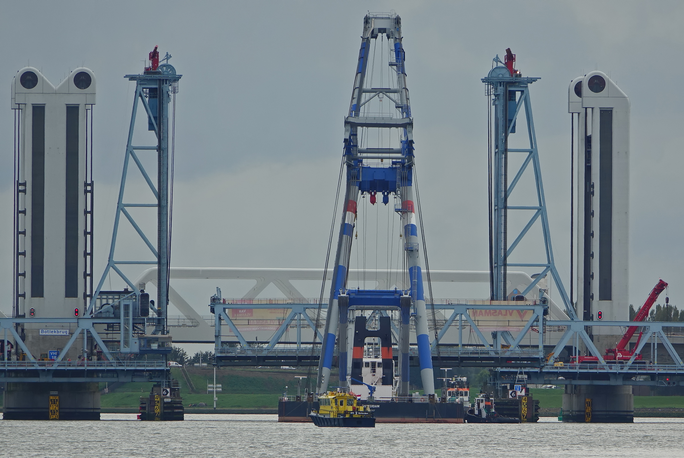 Verwijderen van het beweegbare deel van de oude Botlekbrug 8-10-2017